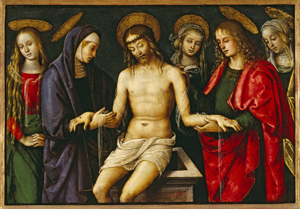 Pietà, by Antonio da Viterbo (Antonio del Massaro), tempera on panel, c. 1505, High Museum of Art